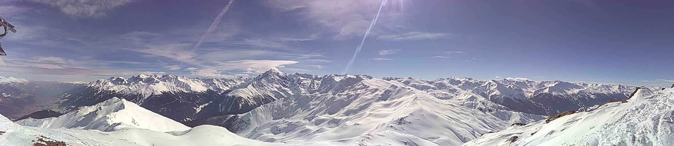 Panorama fotografiert vom Piz Chavalatsch.